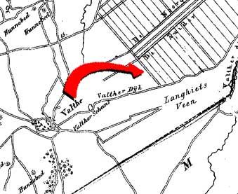 Fragment omgeving Valthe (de locatie van de Valtherblokken door mij met rode pijl gemarkeerd)